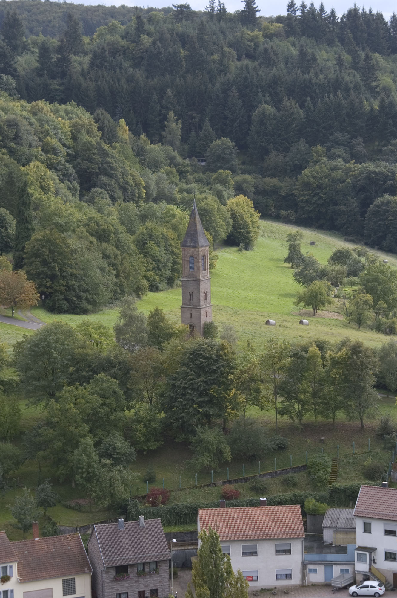 nahe dem Friedhof auf einer Anhöhe südlich des Dorfes: Protestantischer Glockenturm; Sandsteinquaderbau mit Spitzhelm, 1886, Architekt Julius Huth, Kaiserslautern; orts- und landschaftsbildprägend